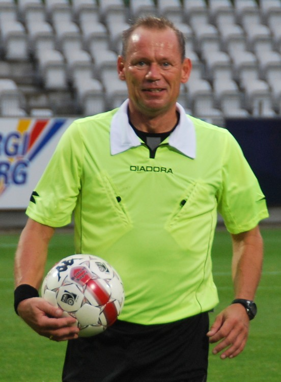 Fodbolddommer Claus Bo Larsen. Her under en kamp i 1. division imellem Viborg FF og FC Fyn på Viborg Stadion.